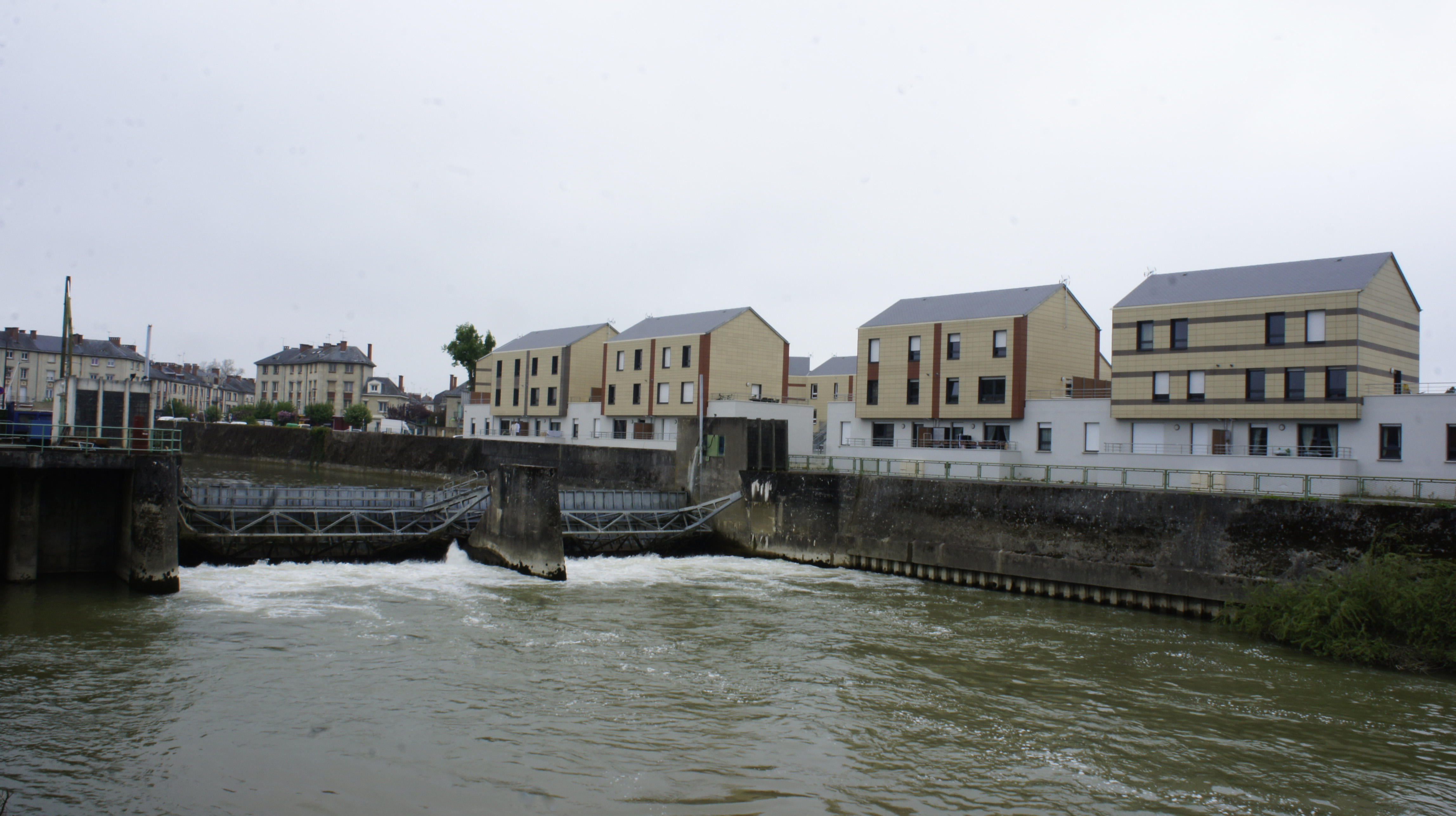 Barrage sur l'Aisne .